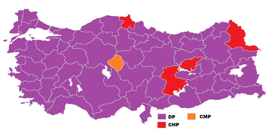 1954 genel seçimleri sonuçlarının Türkiye haritasında gösterimi.